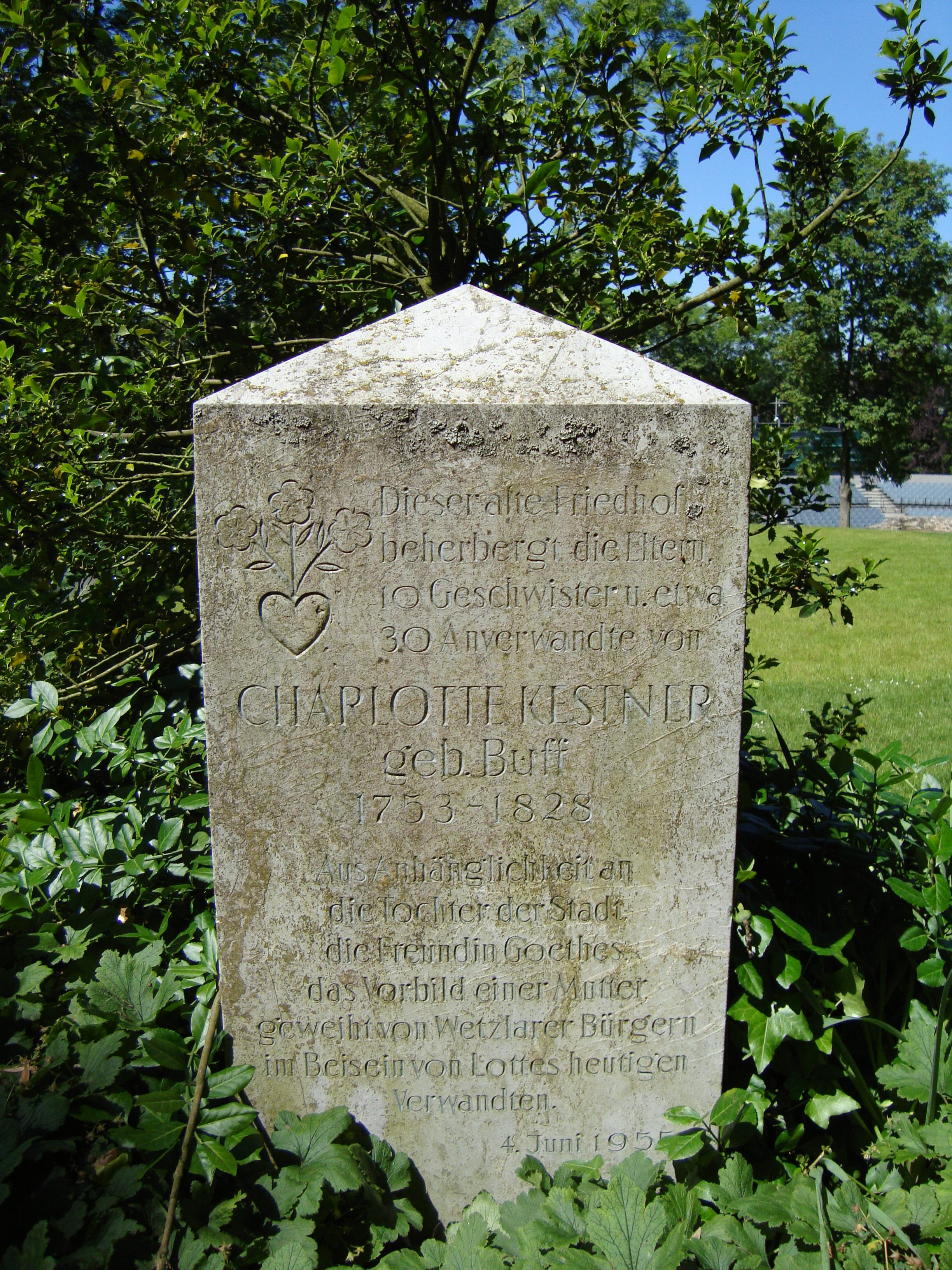 Gedenkstein für Charlotte Buff in Wetzlar